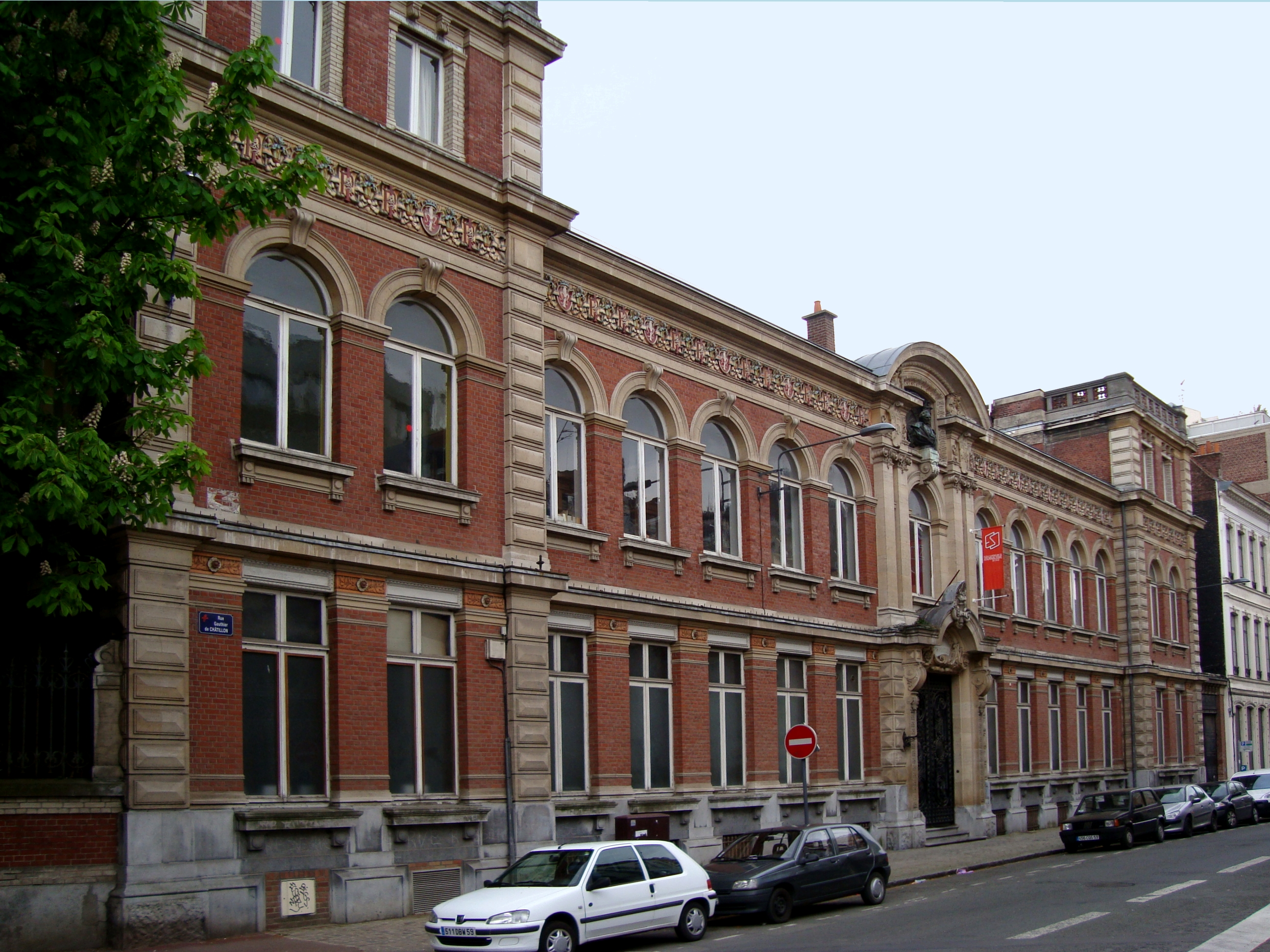 Les locaux de l'école supérieure de journalisme de Lille (Nord), installée dans le bâtiment de l'ancien Institut de Physique de Lille.Architecte : Carlos Batteur